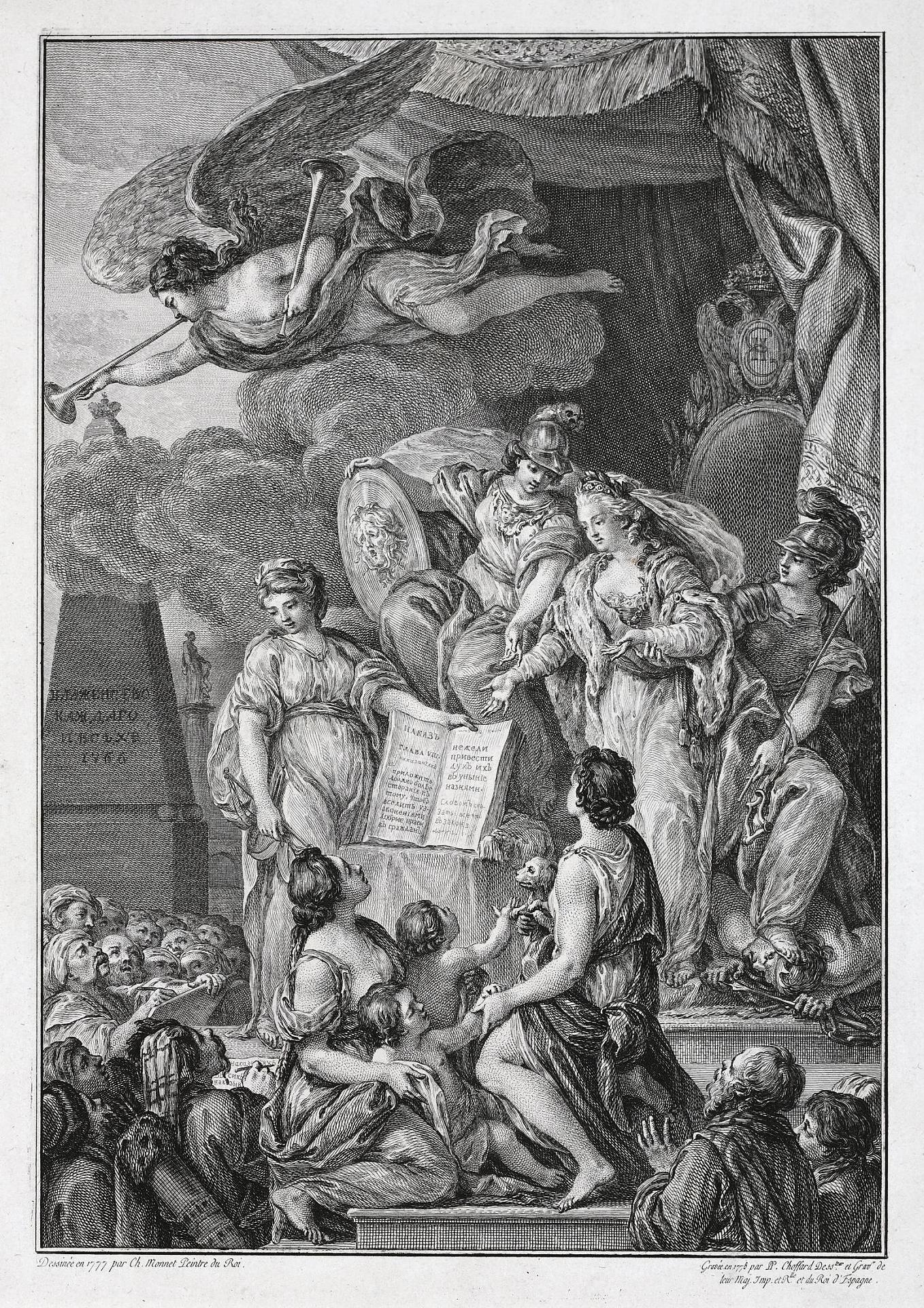 Аллегория на императрицу Екатерину II с текстом 'Наказа' Франция, 1778 г. Техника: бумага, офорт, гравюра резцом Размеры: 34,7х23 см Инвентарный номер: ЭРГ-27401